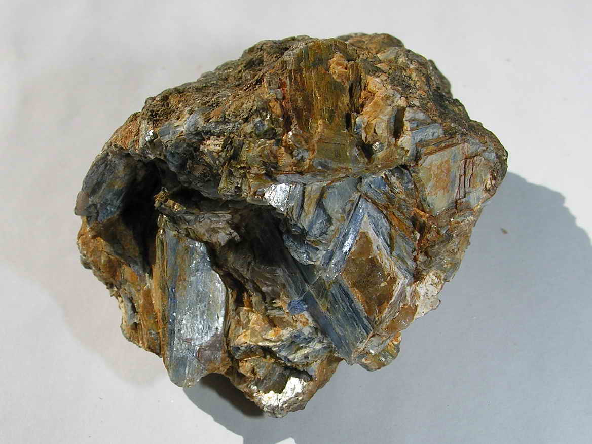 asbesto